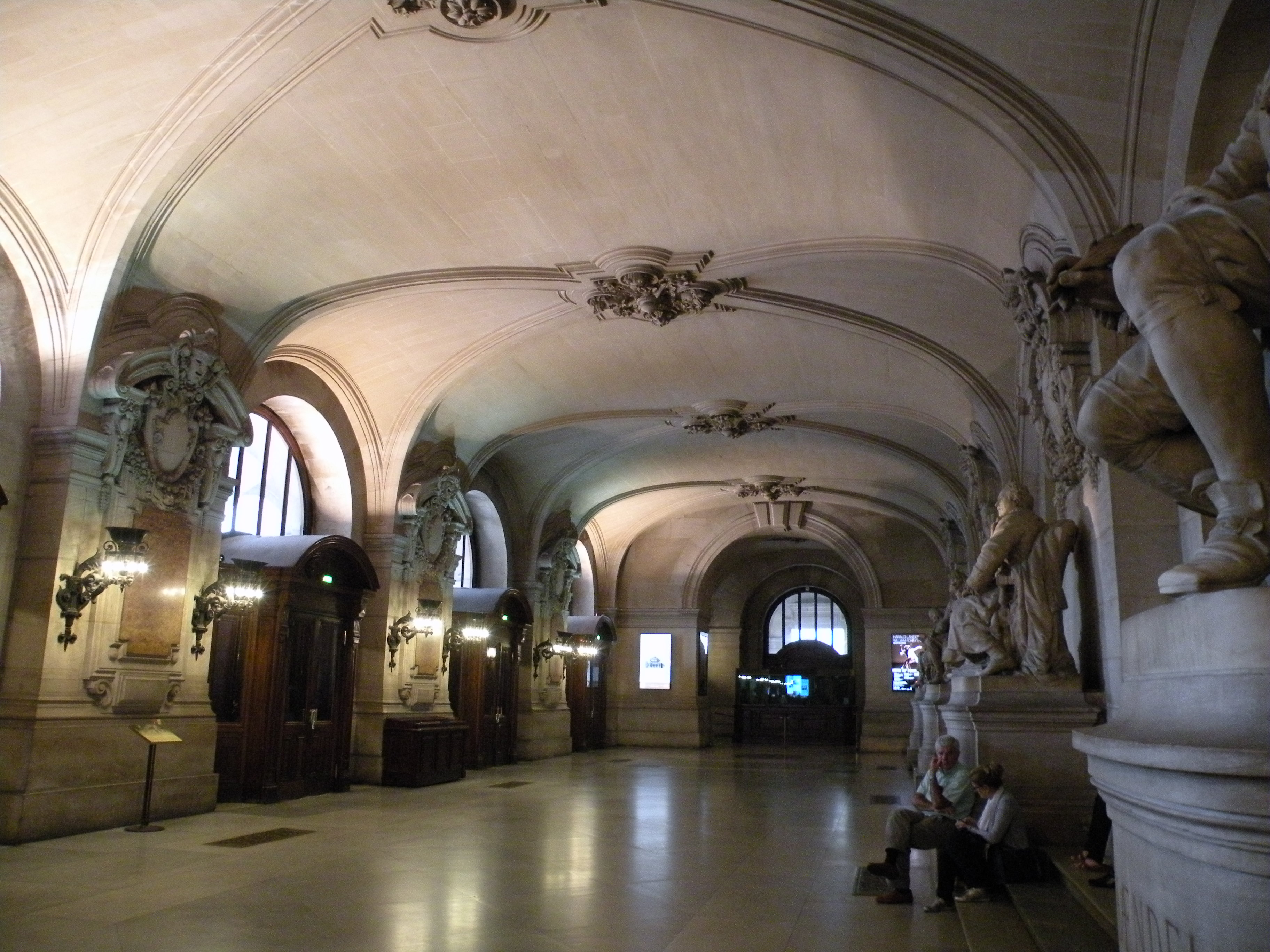 Opéra Garnier - Grand vestibule